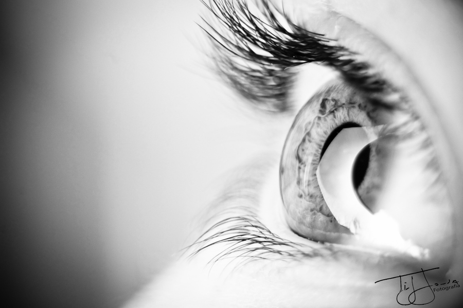 Глаз человека в двухцветном варианте.